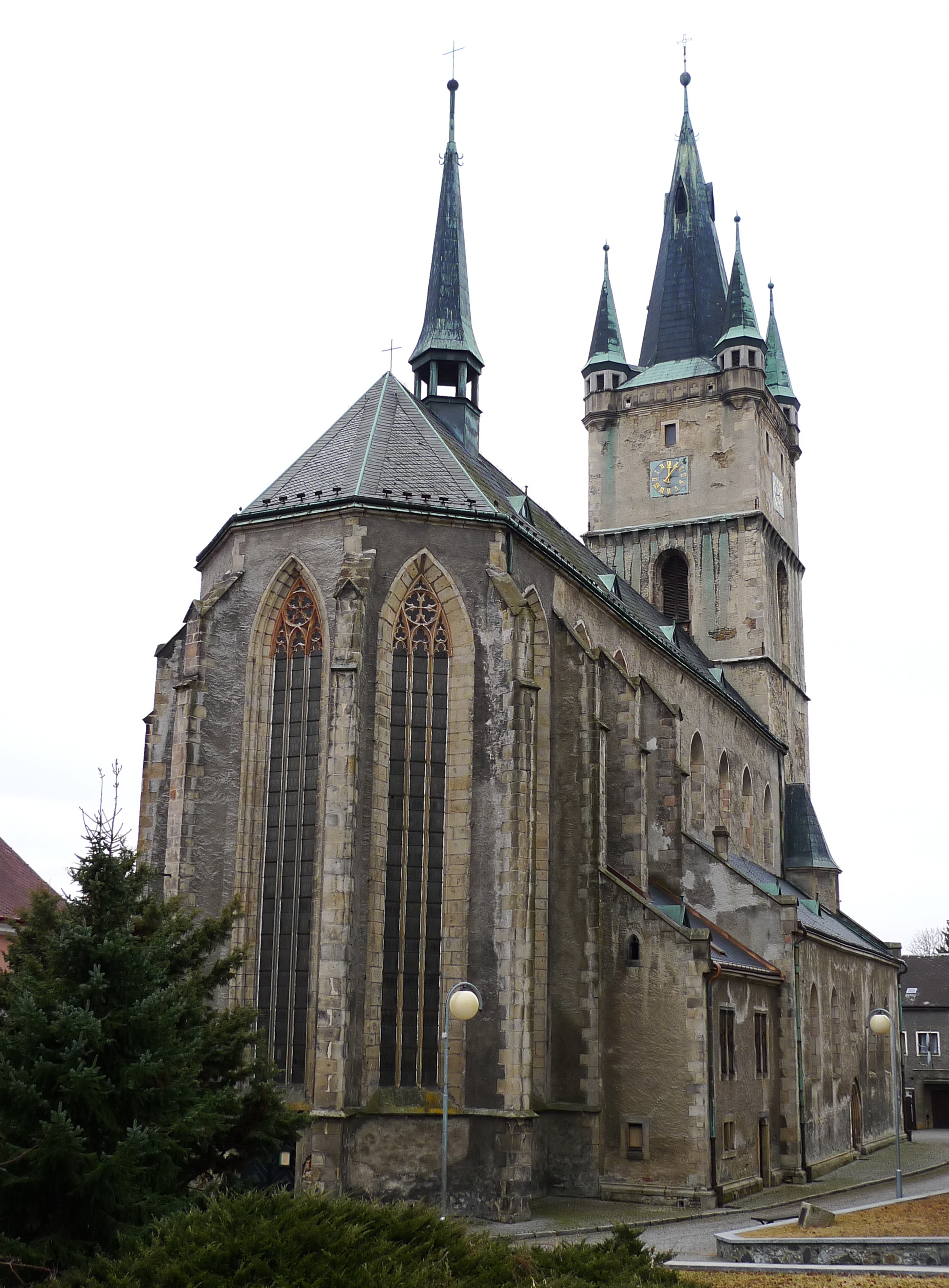 Kostel Nanebevzetí P. Marie (Tachov), Tachov